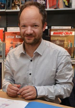 Mathieu Sapin in 2015 June